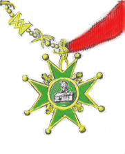 revers de la médaille de l'Ordre_royal_et_militaire_de_st_Lazard_de Jérusalem_et__hospitalier de_notre dame du_mont_Carmel; à gauche le collier de maitre à droite le ruban des chevaliers. Au centre du médaillon est saint Lazard entouré de sinople.